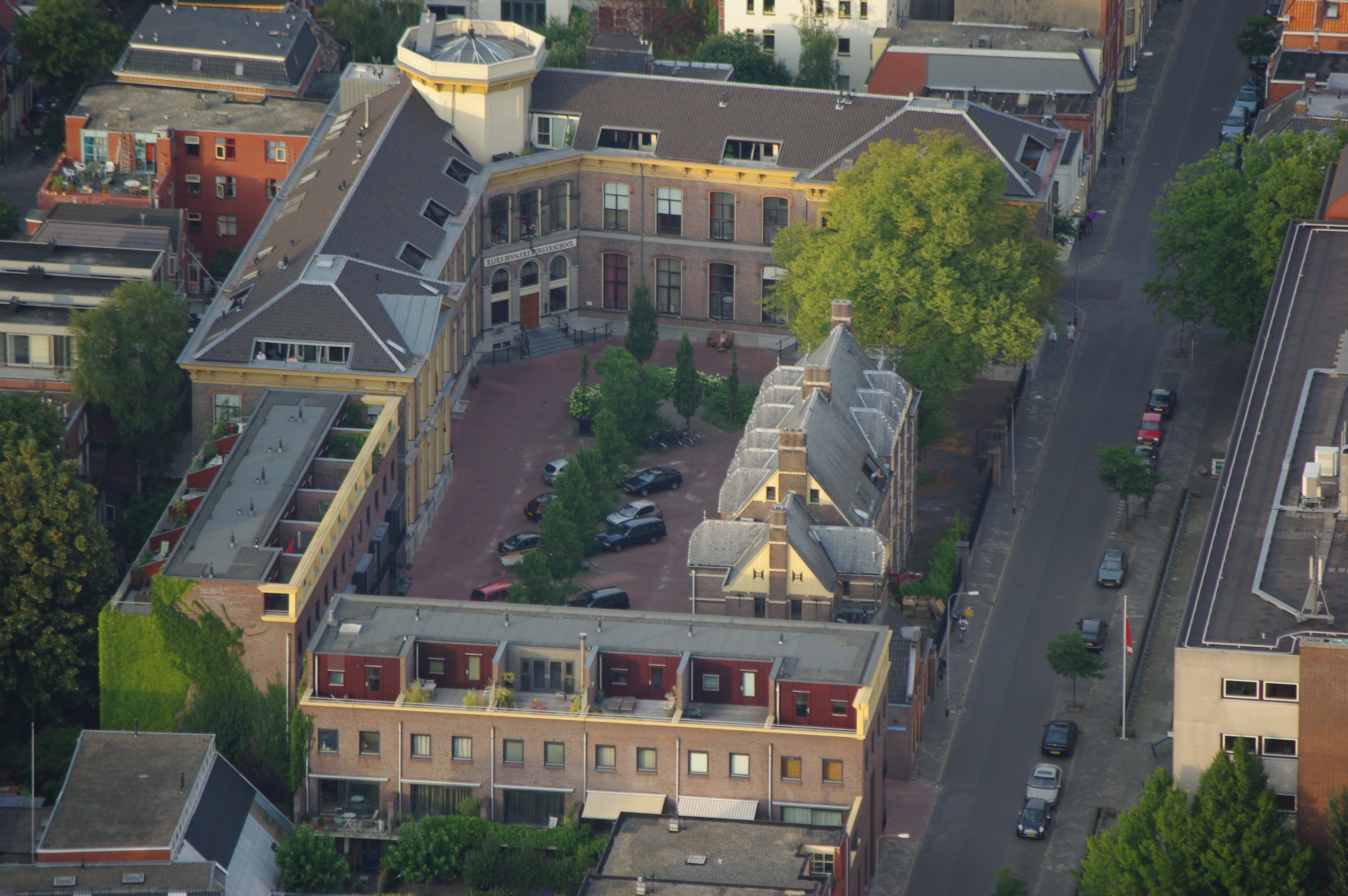 Luchtfoto van het complex, dat naast het hoofdgebouw bestaat uit een bijgebouw door J.A.M. Vrijman in 1909 en 2 door Oving Architecten toegevoegde woningblokken (2002). De Gymzaal uit 1915 is helaas verloren gegaan.